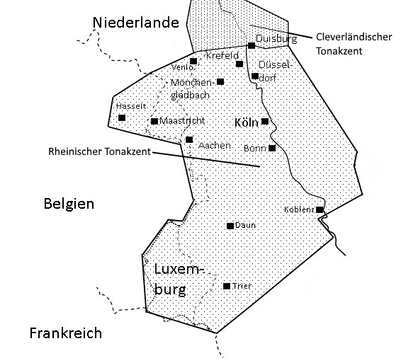 Verbreitung der „rheinischen Schärfung“ in den Ripuarischen und Limburgischen Dialekten.